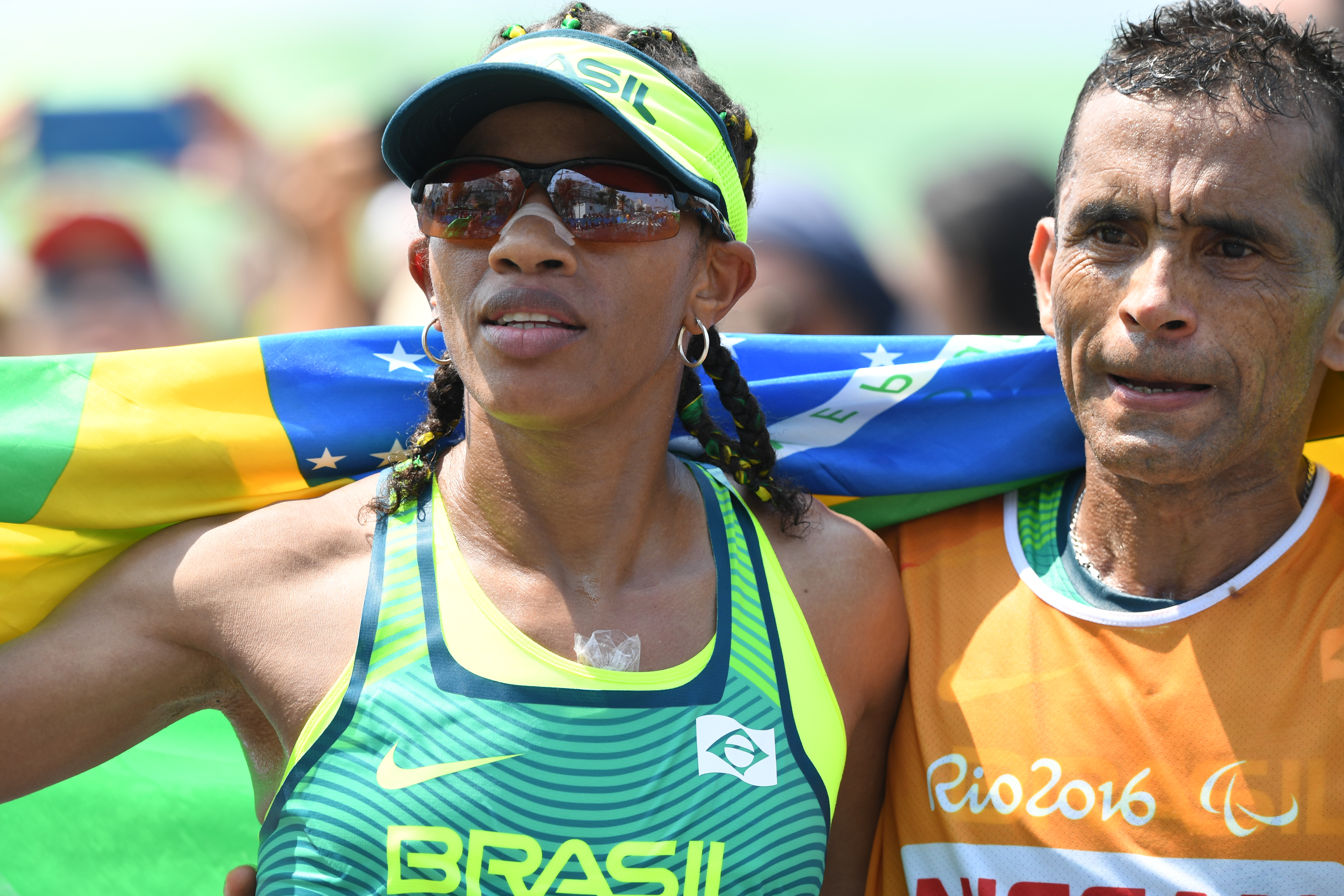 Rio de Janeiro - A brasileira, Edneusa Santos Dorta foi bronze na categoria T12 na maratona Paralímpica T12 e T46, na praia de Copacabana (Tânia Rêgo/Agência Brasil)